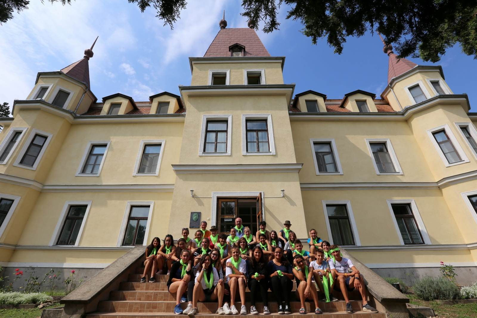 Prohászka Ottokár Élet Háza (Csobánka) - erdélyi gyerekek nyári táborozása